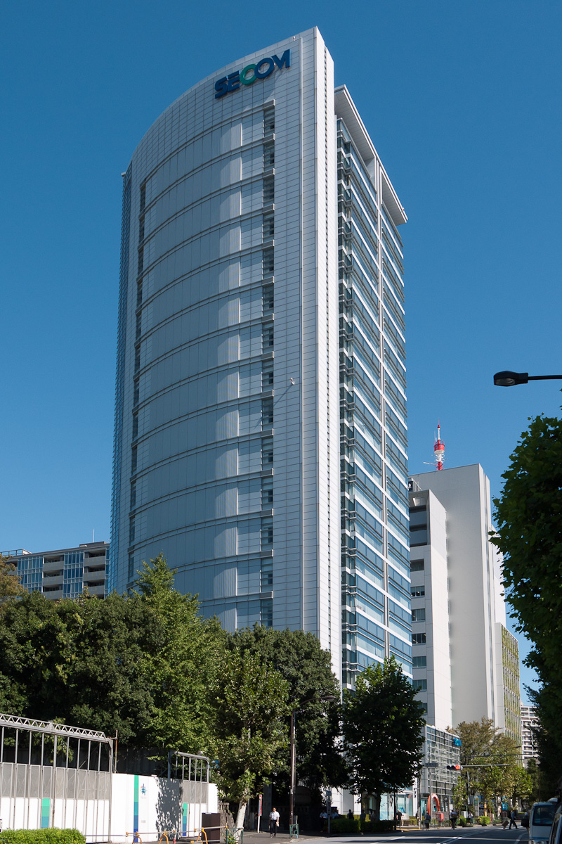 セコム本社ビル、東京都渋谷区神宮前1丁目。